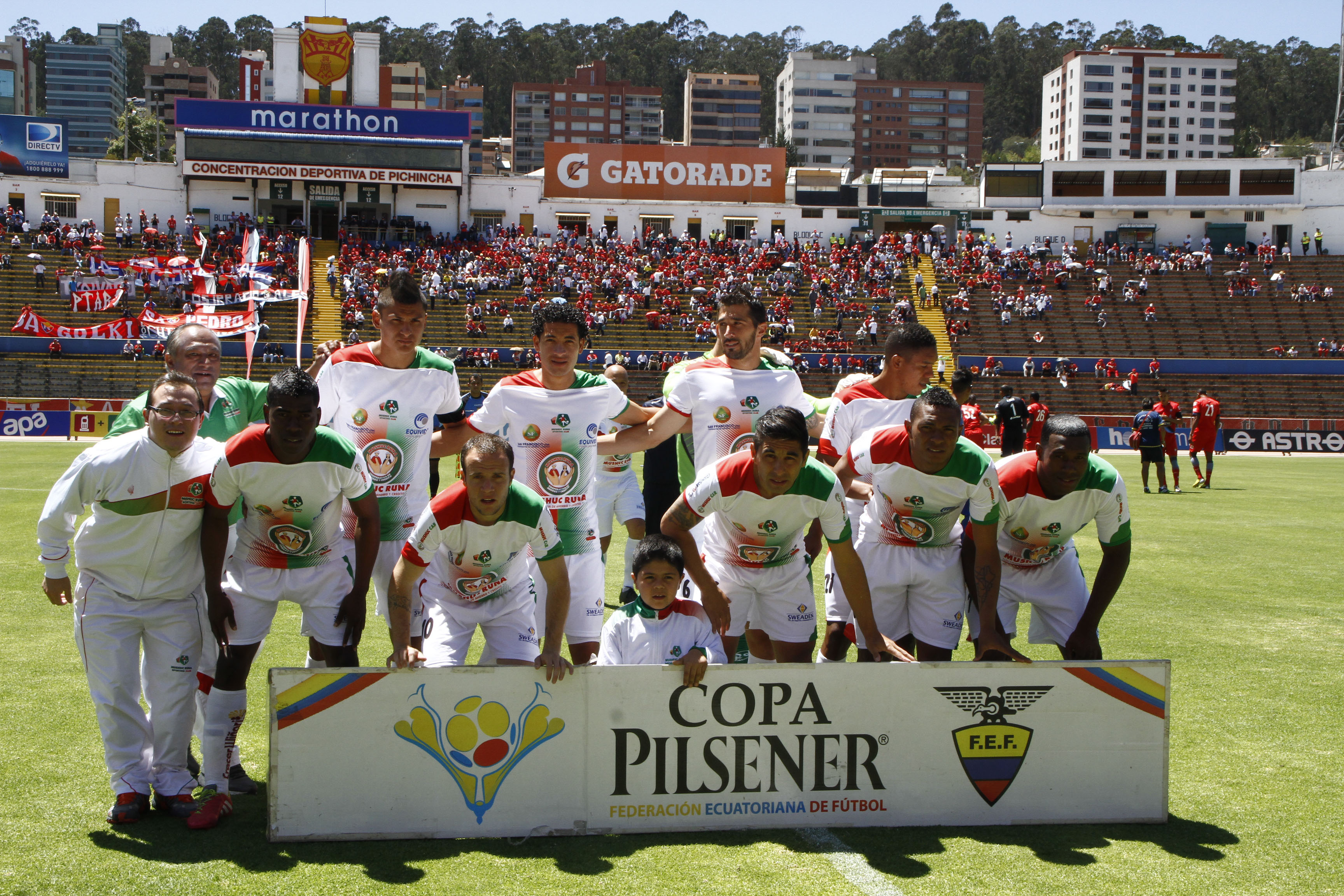 Quito, 31 ago (Andes).- En el campeonato estadio Olímpico Atahualpa se llevóa a cabo la quinta fecha de la segunda etapa del Campeonato Nacional de Fútbol en la que se enfrentaron los equipos de eL Nacional (rojo) y el Mushuc Runa (blanco). Foto: Micaela Ayala V./Andes